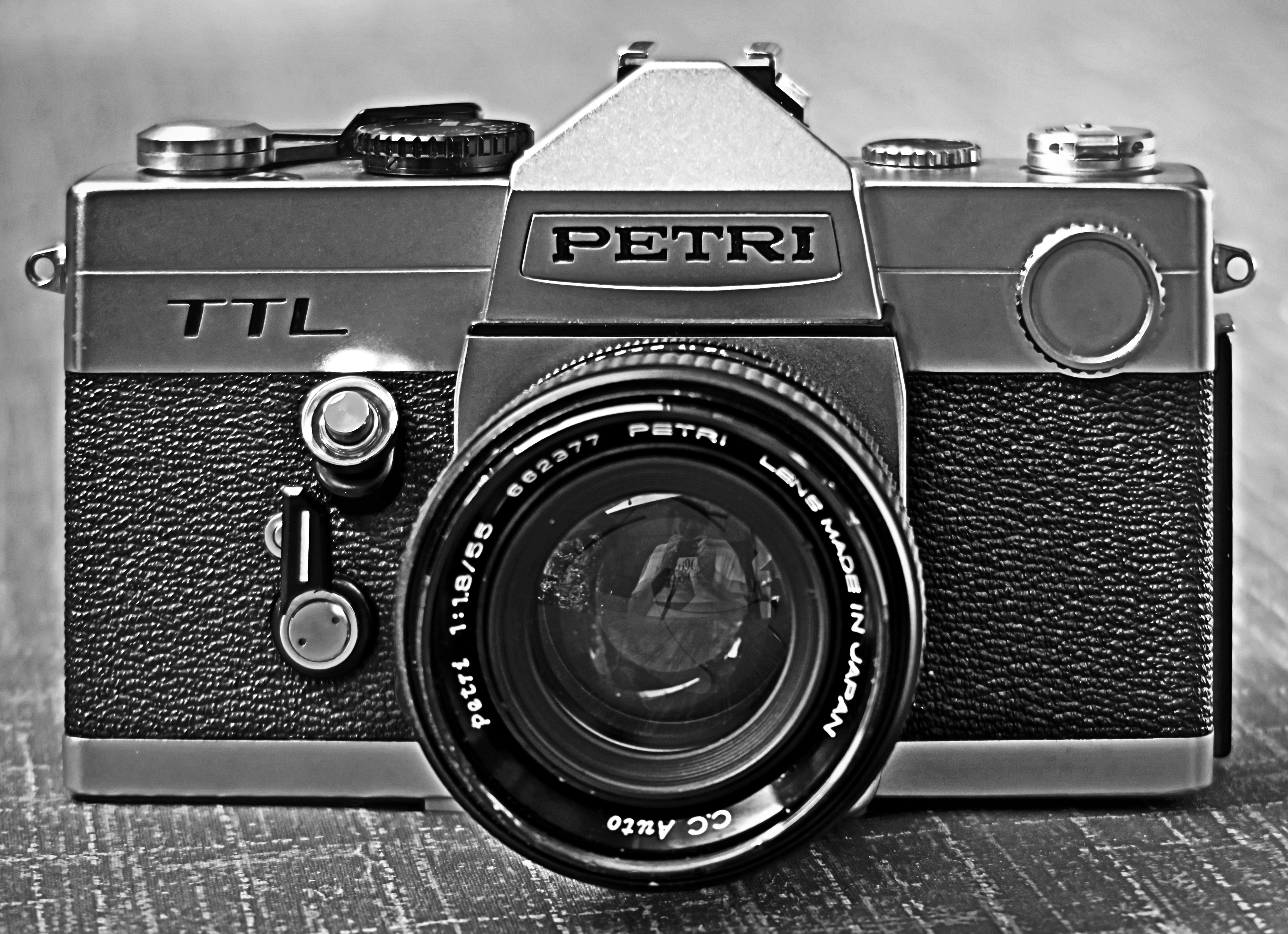 Die Spiegelreflexkamera Petri TTL der japanischen Firma Petri Camera Company aus dem Jahr 1974